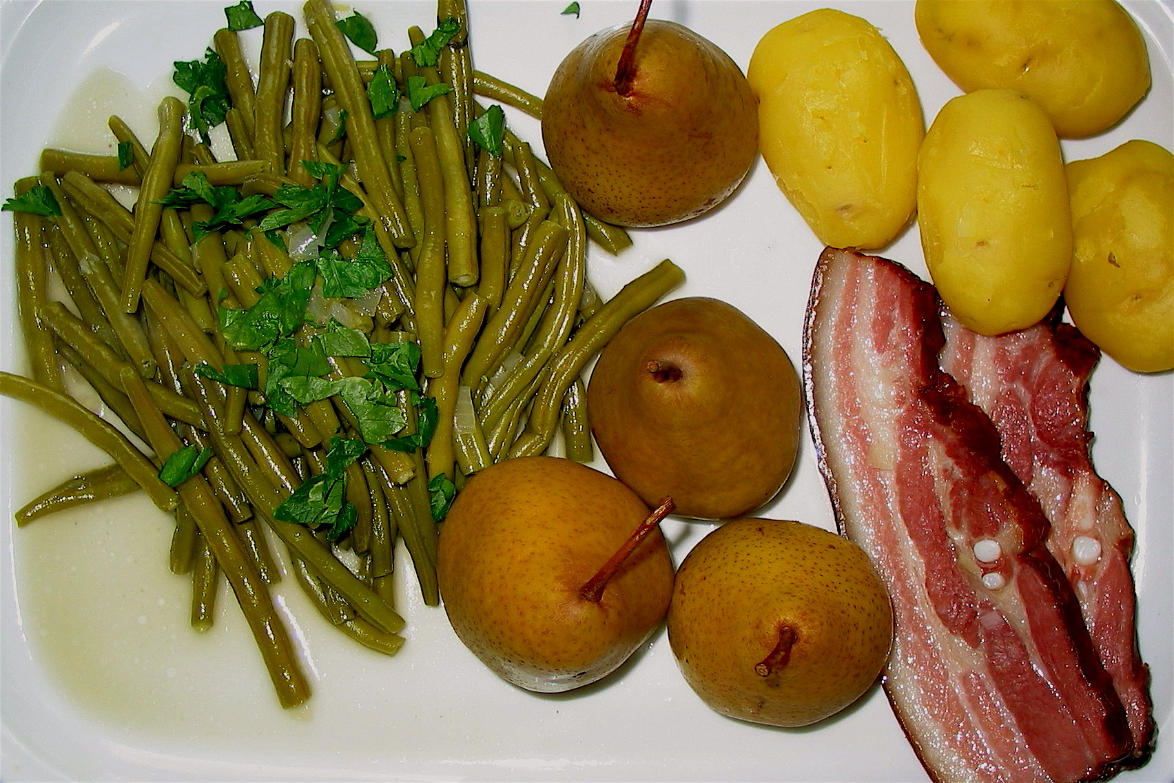 Birnen, Bohnen und Speck. Gekocht und fotografiert von Andreas Bemeleit.